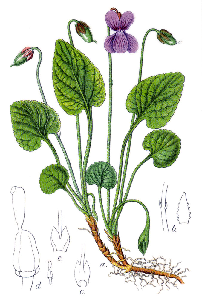 Viola uliginosa Besser Original Caption Grosses Sumpfveilchen, Viola uliginosa